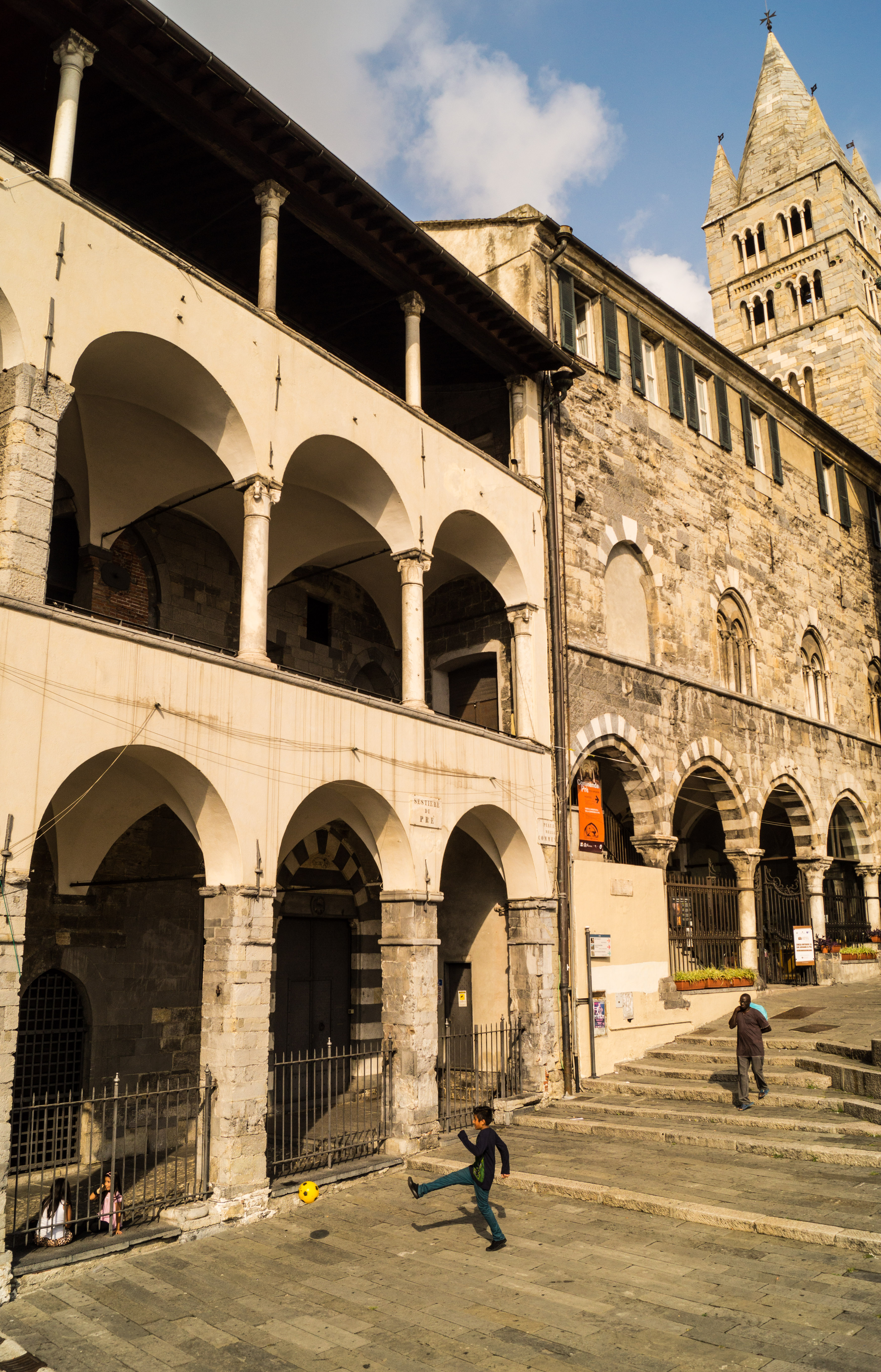 Commenda di San Giovanni di Pré This is a photo of a monument which is part of cultural heritage of Italy.